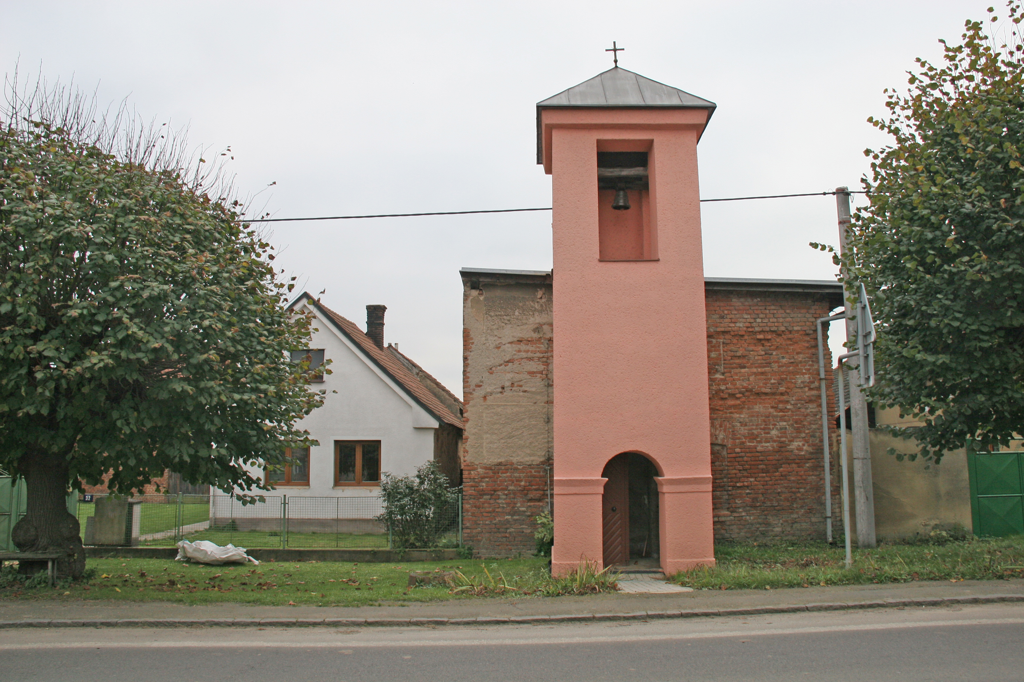 Ostrov zvonička